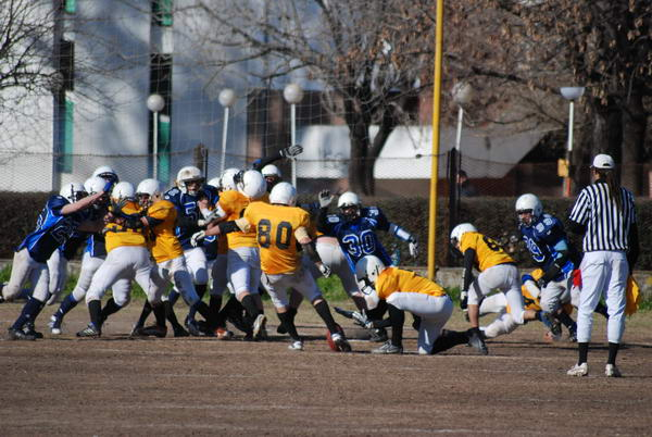 Calabuig pro FG